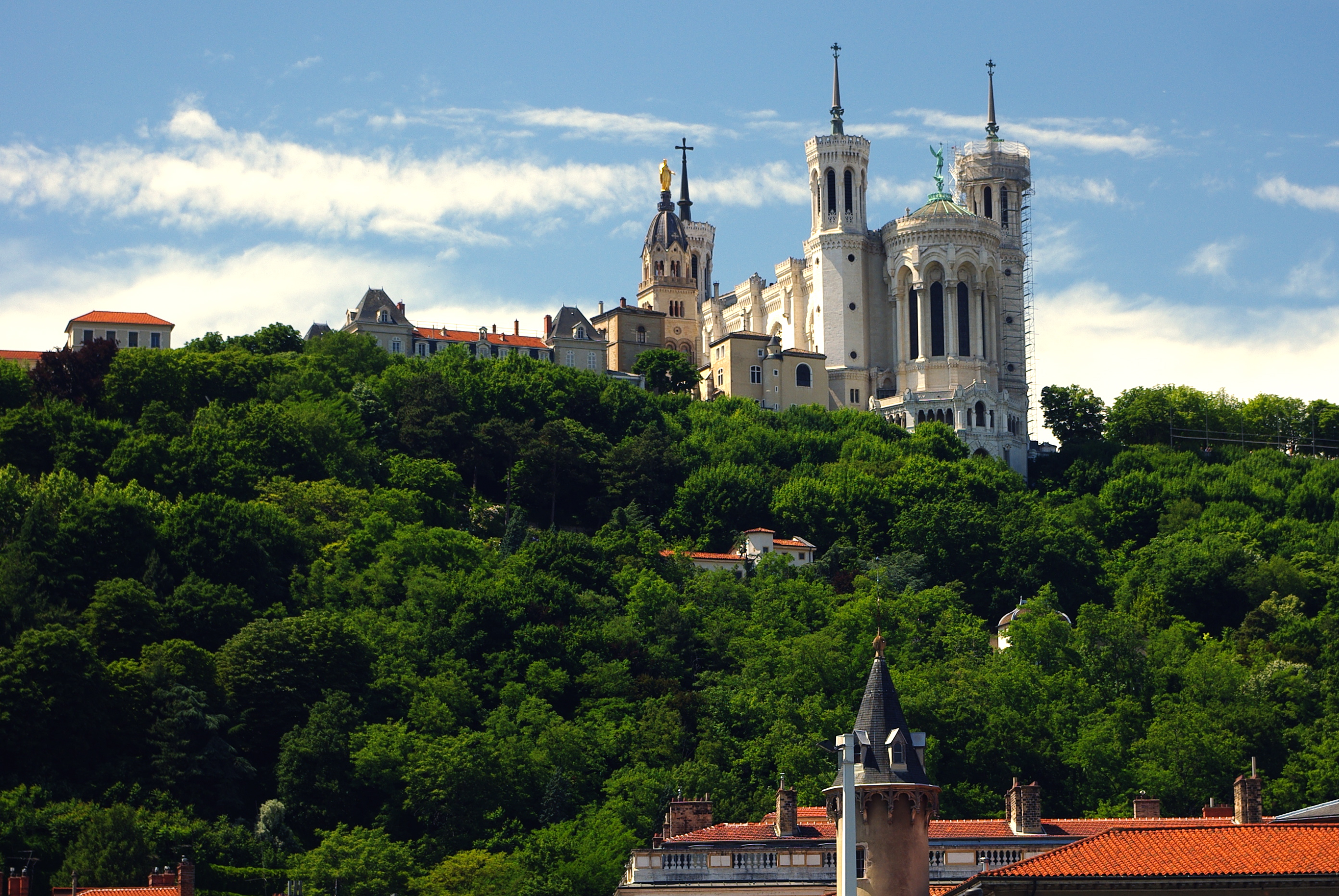 Vue de la Basilique de Fourvière depuis les quais de Saone